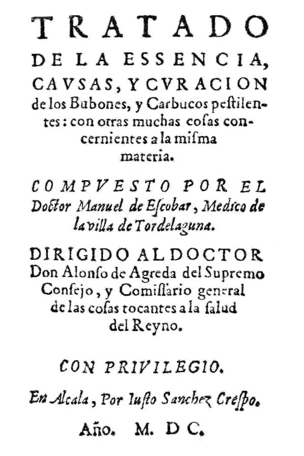 Portada del "Tratado de la essencia, cavsas, y curacion de los Bubones y Carbuncos pestilentes". Publicado por el Dr. Manuel de Escobar, en Alcalá de Henares en 1600.